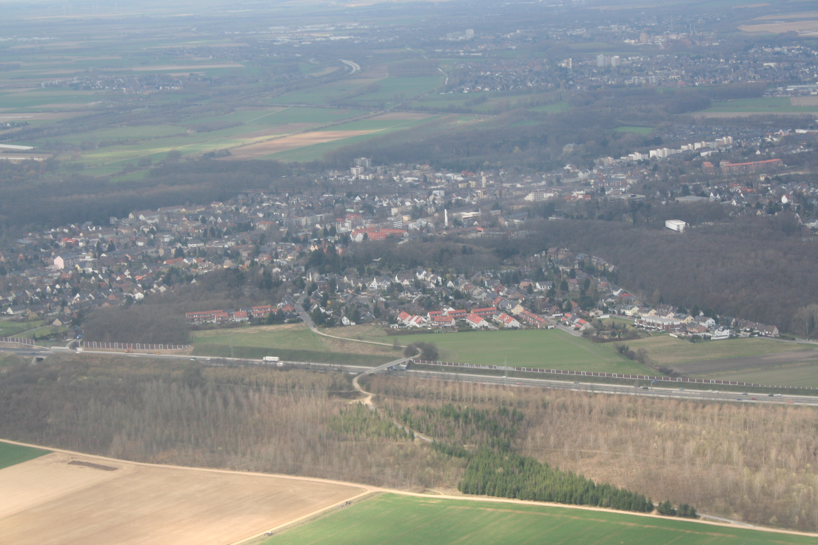 Horrem von Süden aus (Marienfeld) fotografiert. Im Vordergrund die BAB A4.